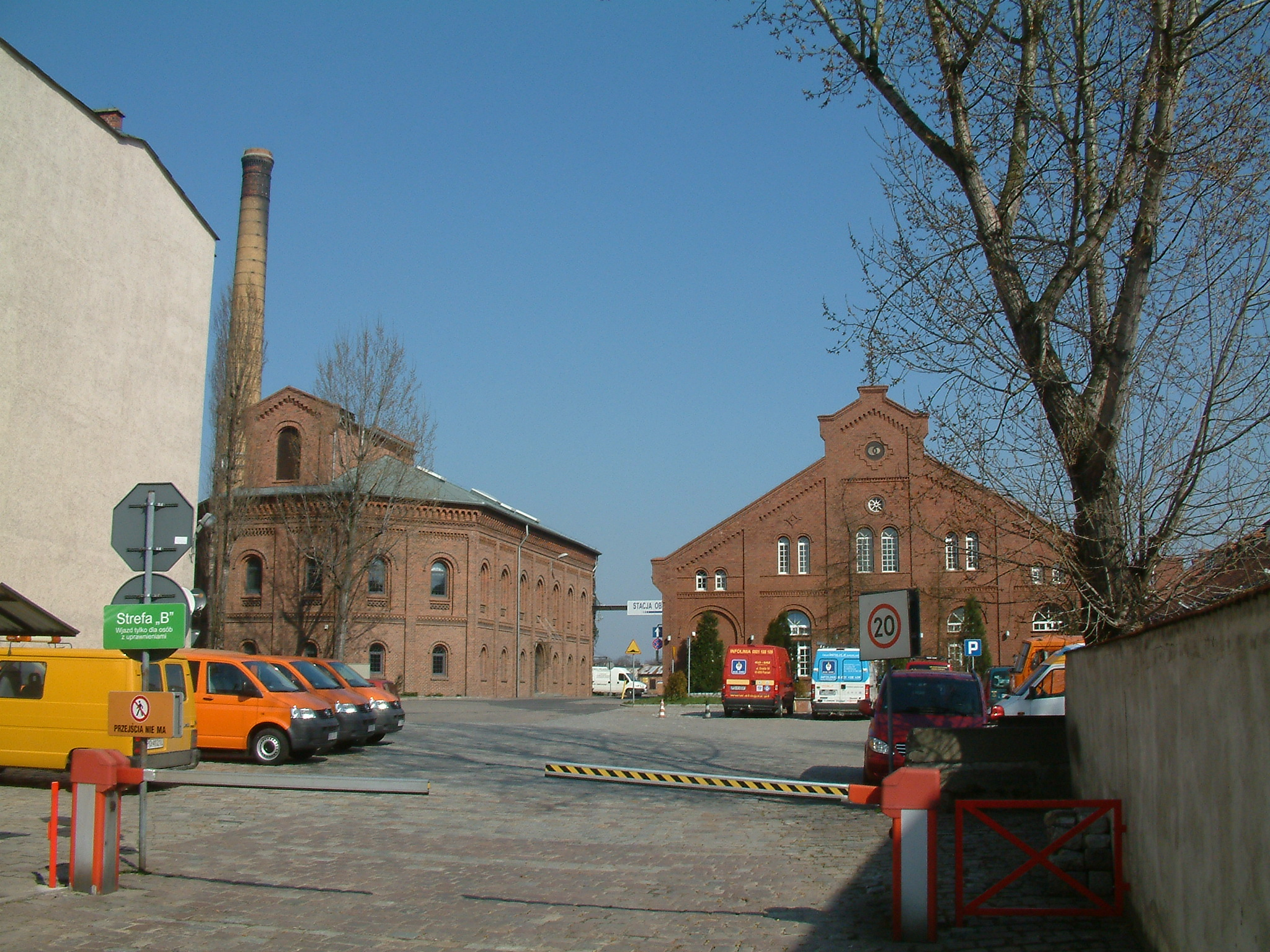 Gas-works on Grobla Str. in Poznań